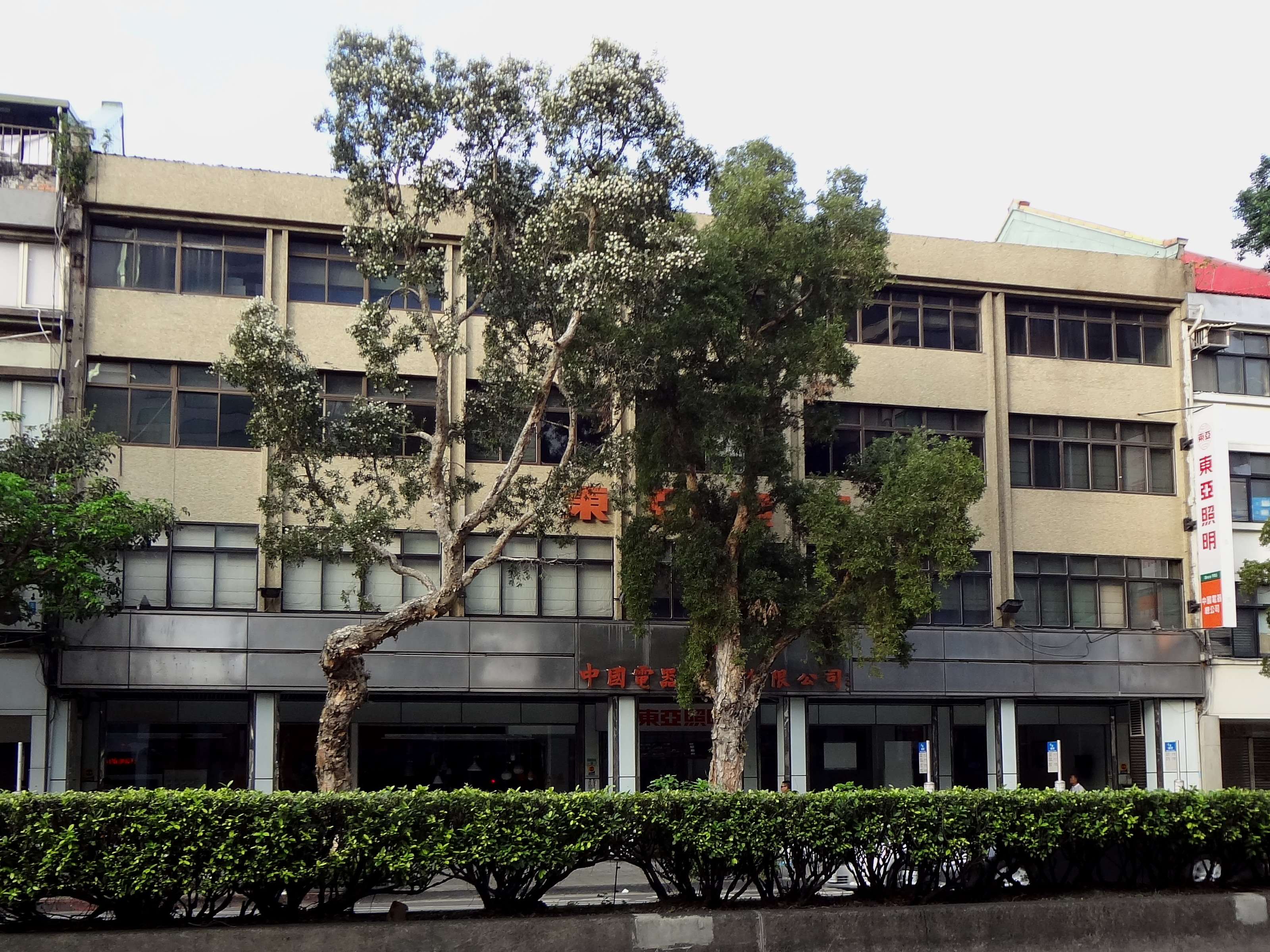 中文（台灣）: 中國電器公司總部，位於臺北市中正區忠孝東路二段9號。